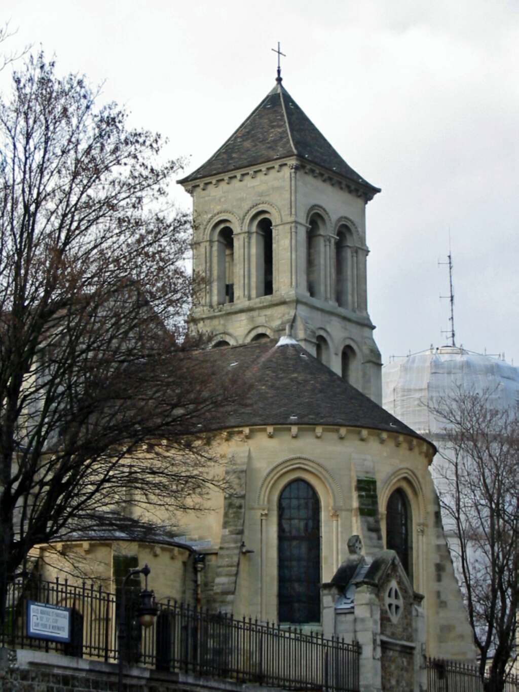 Saint-Pierre de Montmartre (chevet et clocher) Photo JH Mora, janvier 2005